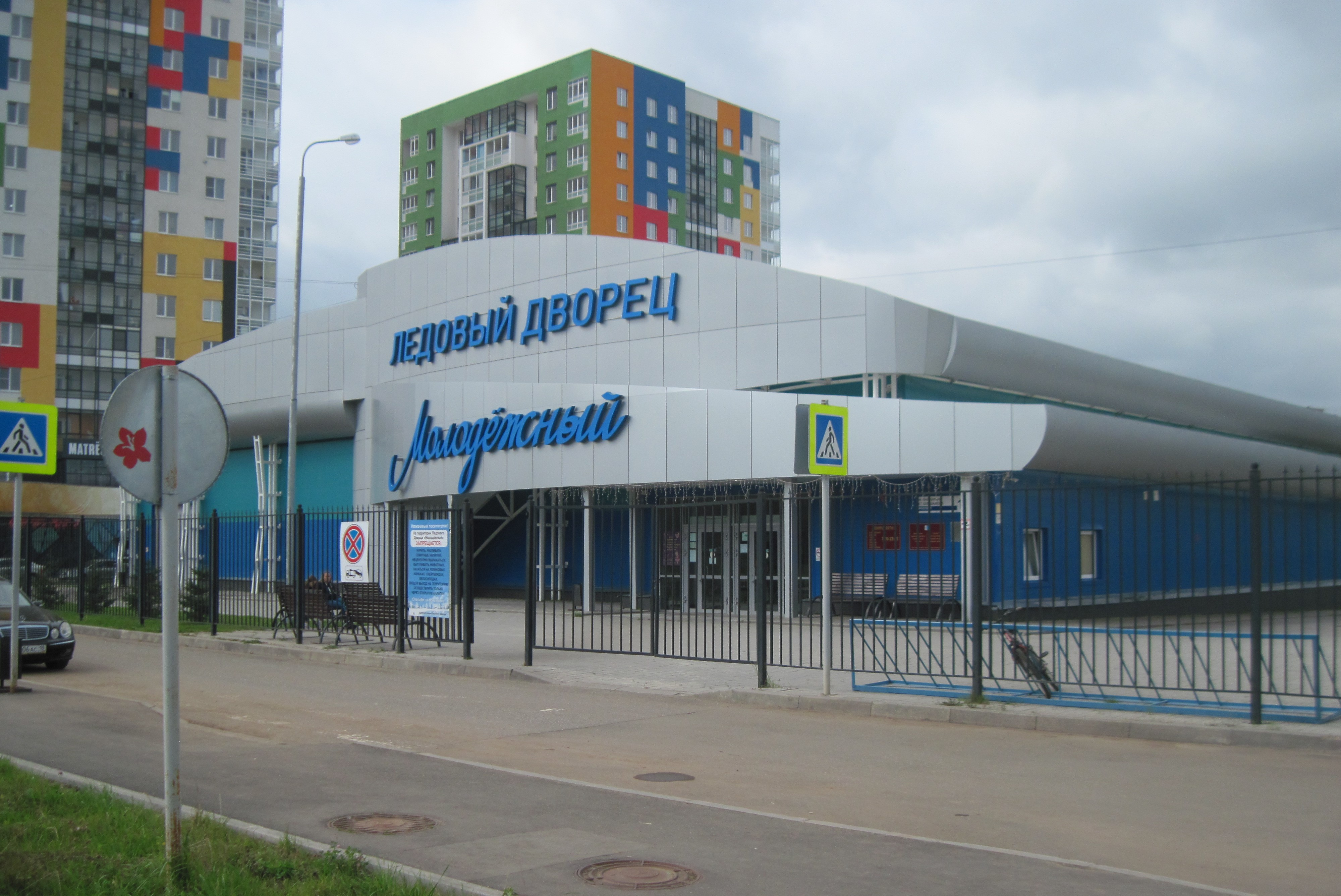 город Ижевск, Проспект Калашникова,15